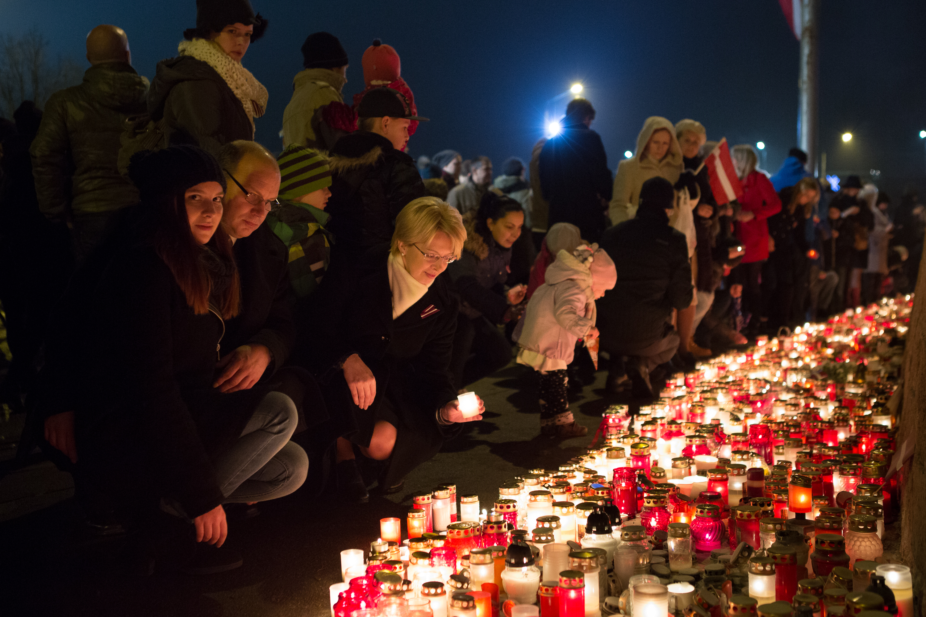 2014.gada 11.novembris. Saeimas priekšsēdētāja Ināra Mūrniece kopā ar ģimeni noliek svecītes 11.novembra krastmalā, atzīmējot Lāčplēša dienu un pieminot Latvijas brīvības cīņās kritušos varoņus. Foto: Ernests Dinka, Saeimas Kanceleja Izmantošanas noteikumi: saeima.lv/lv/autortiesibas